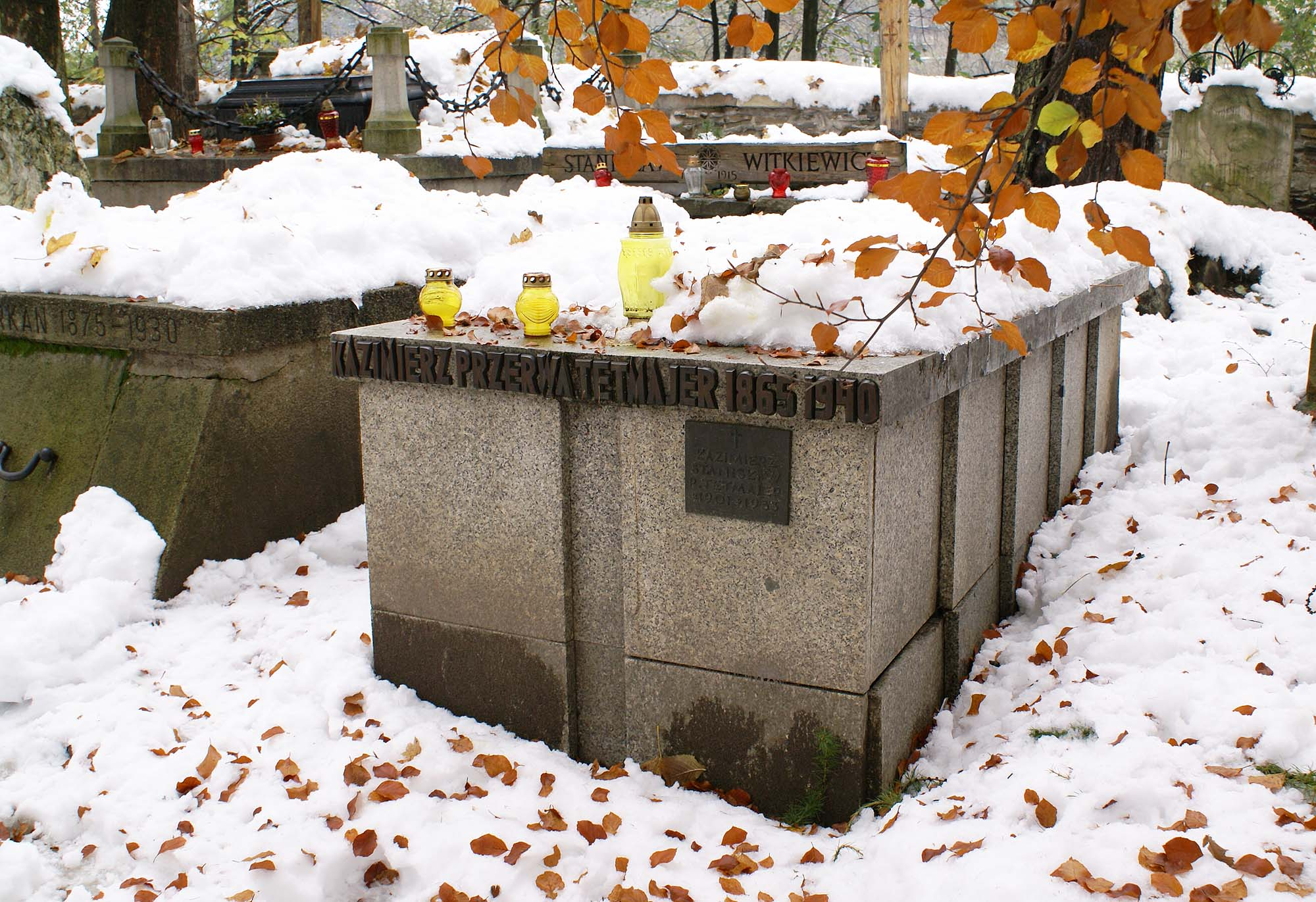 Zakopane, cmentarz "Na Pęksowym Brzyzku"